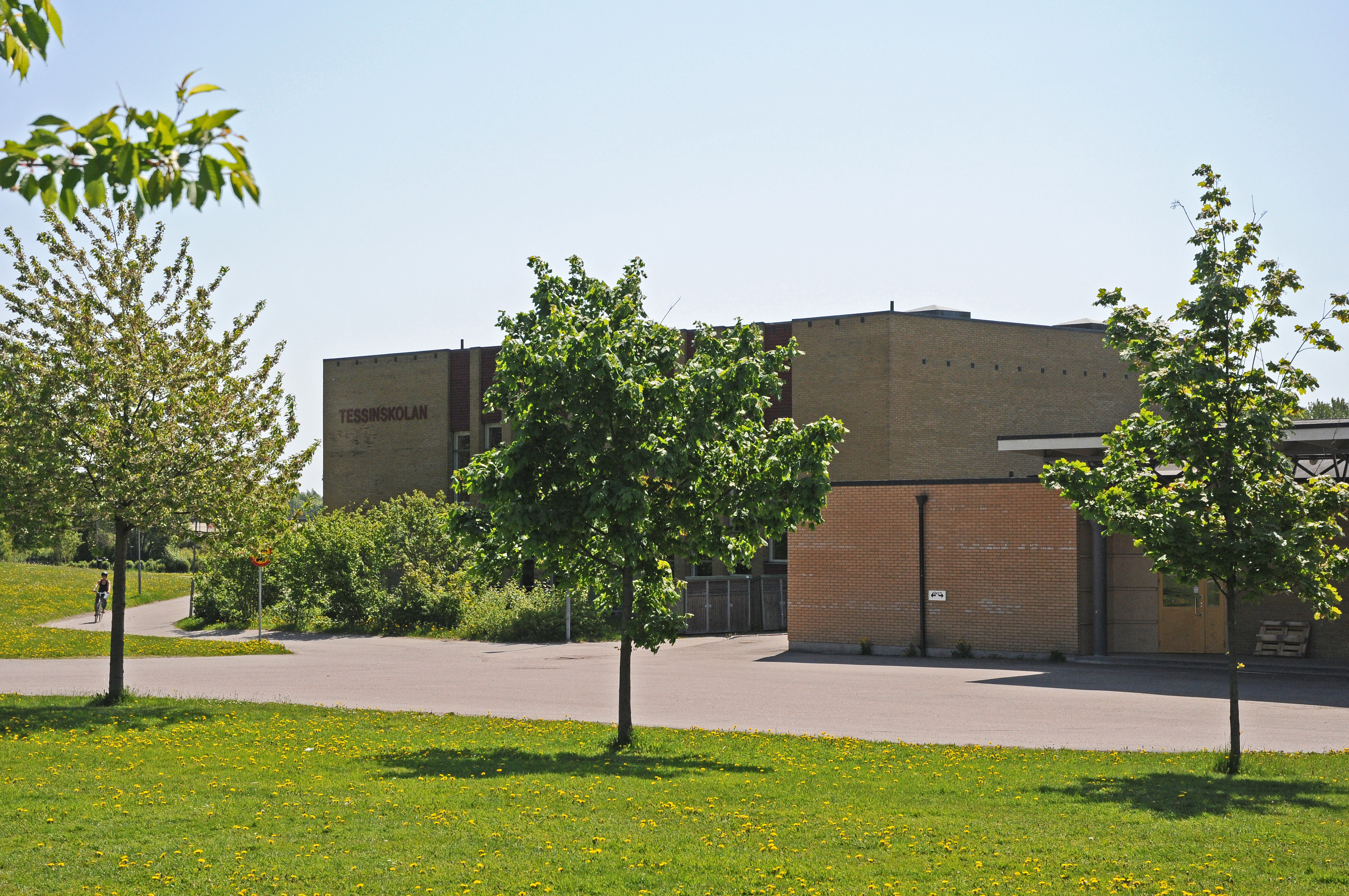 Tessinskolan i Nyköping